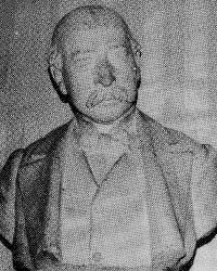 Giuseppe_Di_Menza.jpg